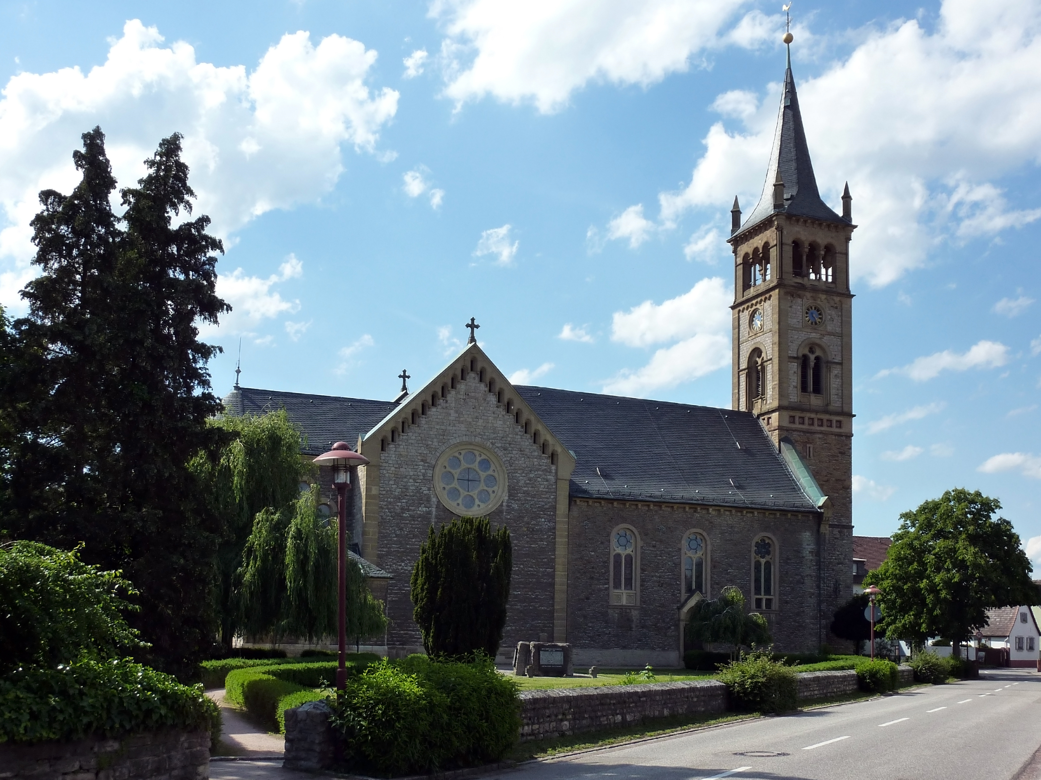 Katholische St. Sebastian Kirche in Neuthard